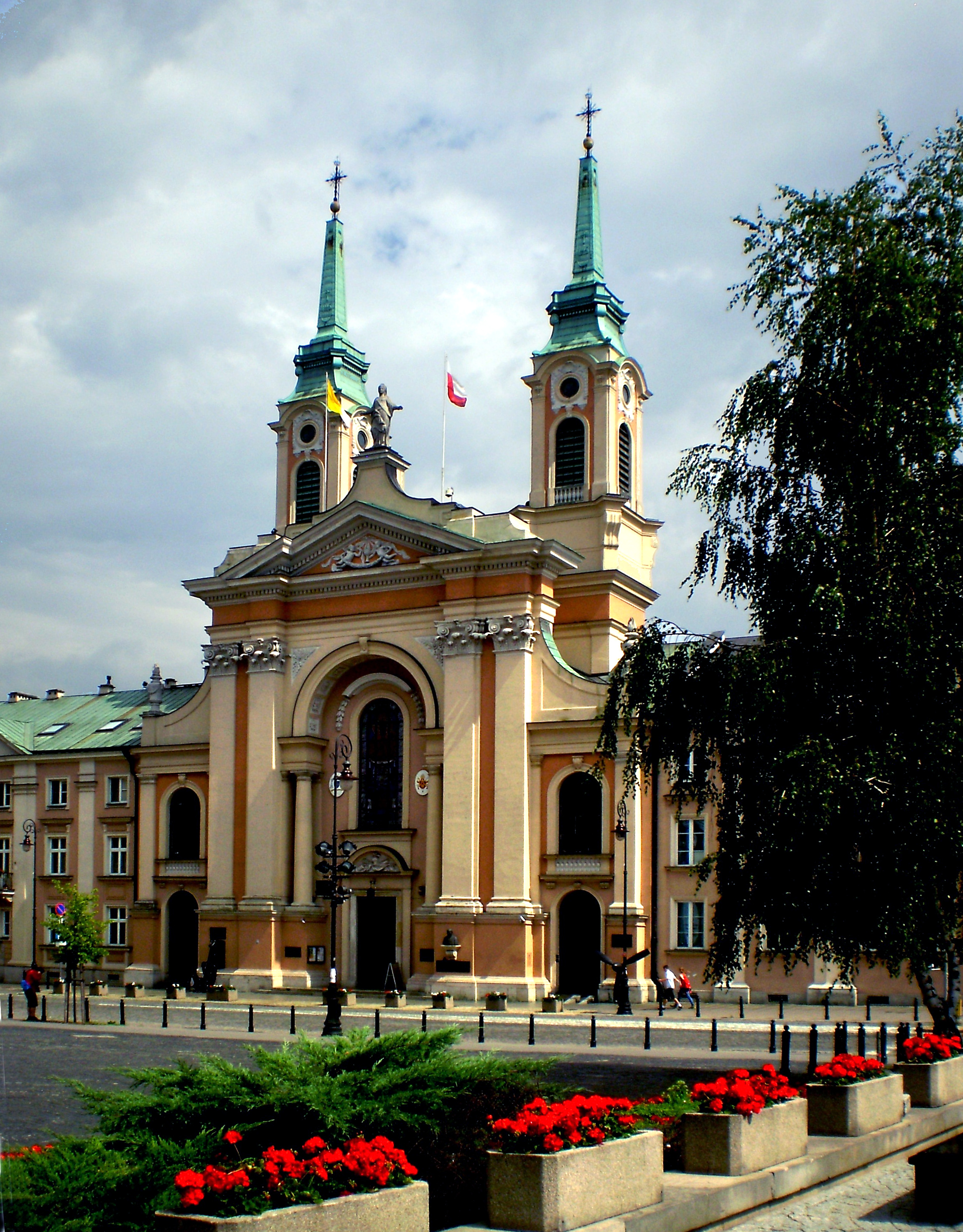 Zespół klasztorny pijarów, kościół p.w. NMP Królowej Polski, obecnie Katedra polowa WP